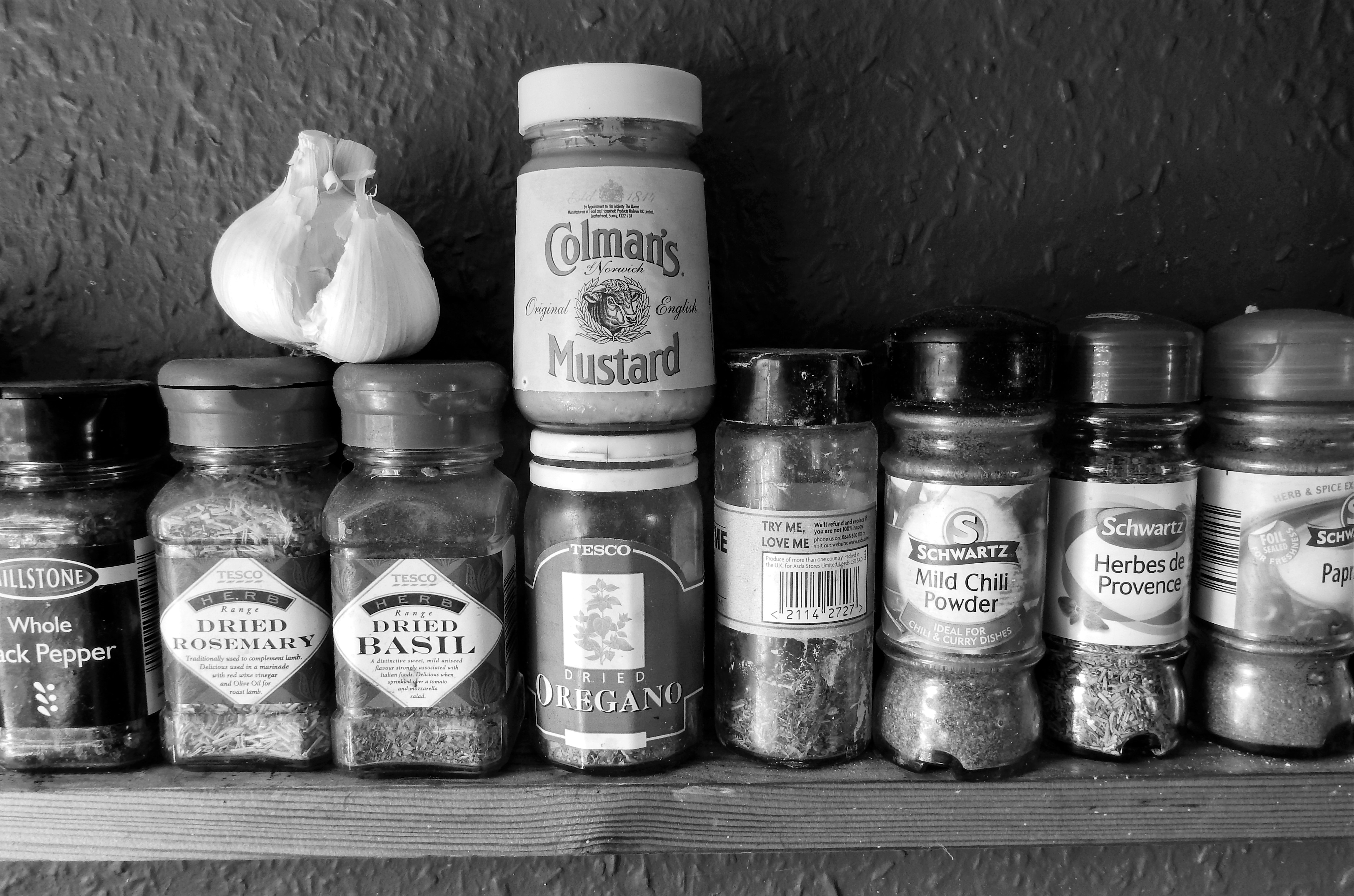 Gewürzregal mit verschiedenen Küchengewürzen (Gewürze, getrocknete Kräuter) und einer Knoblauchknolle in einem Haushalt in Wales, Vereinigtes Königreich.